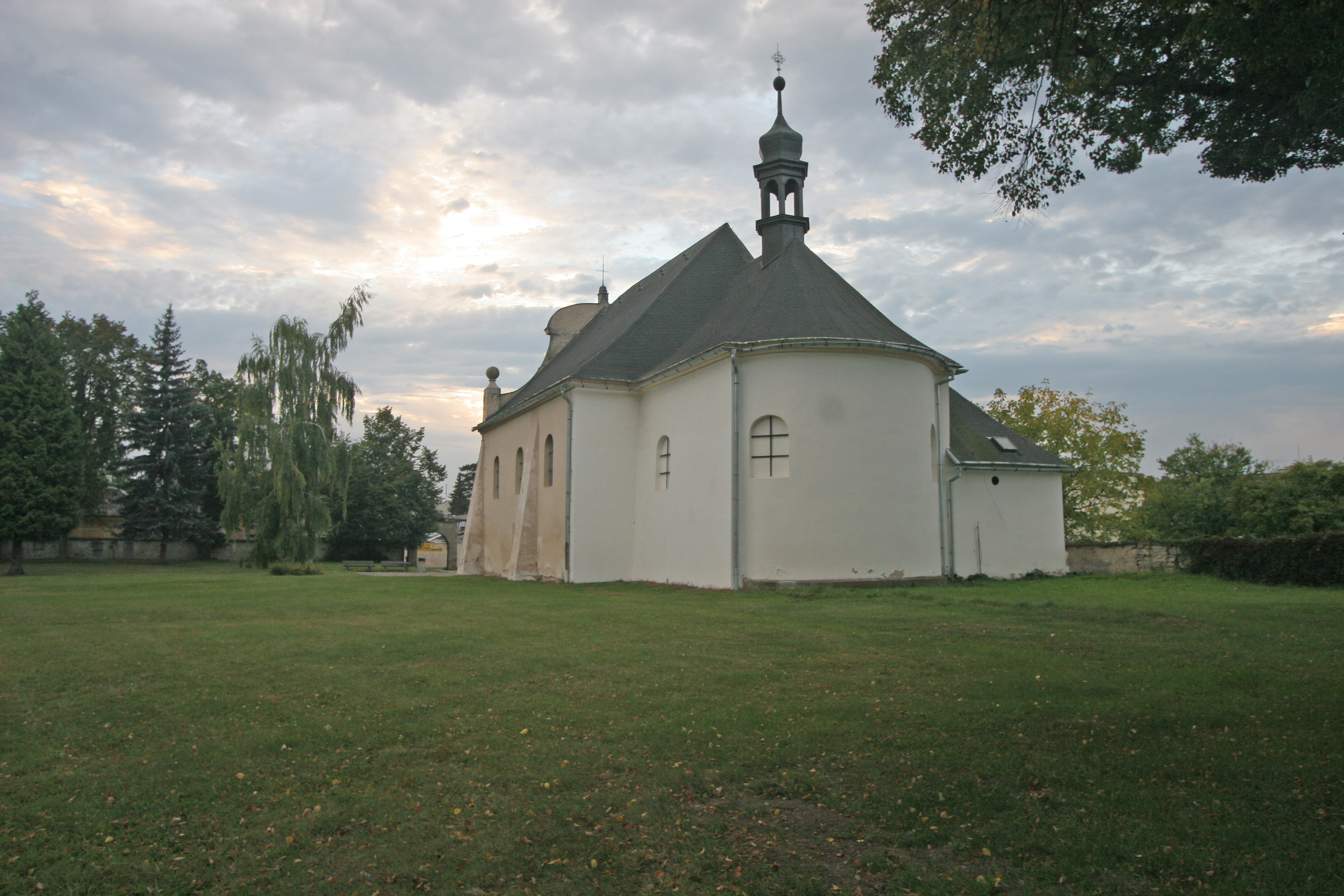 Kostel sv. Barbory (Bakov nad Jizerou), Boleslavská, Bakov nad Jizerou